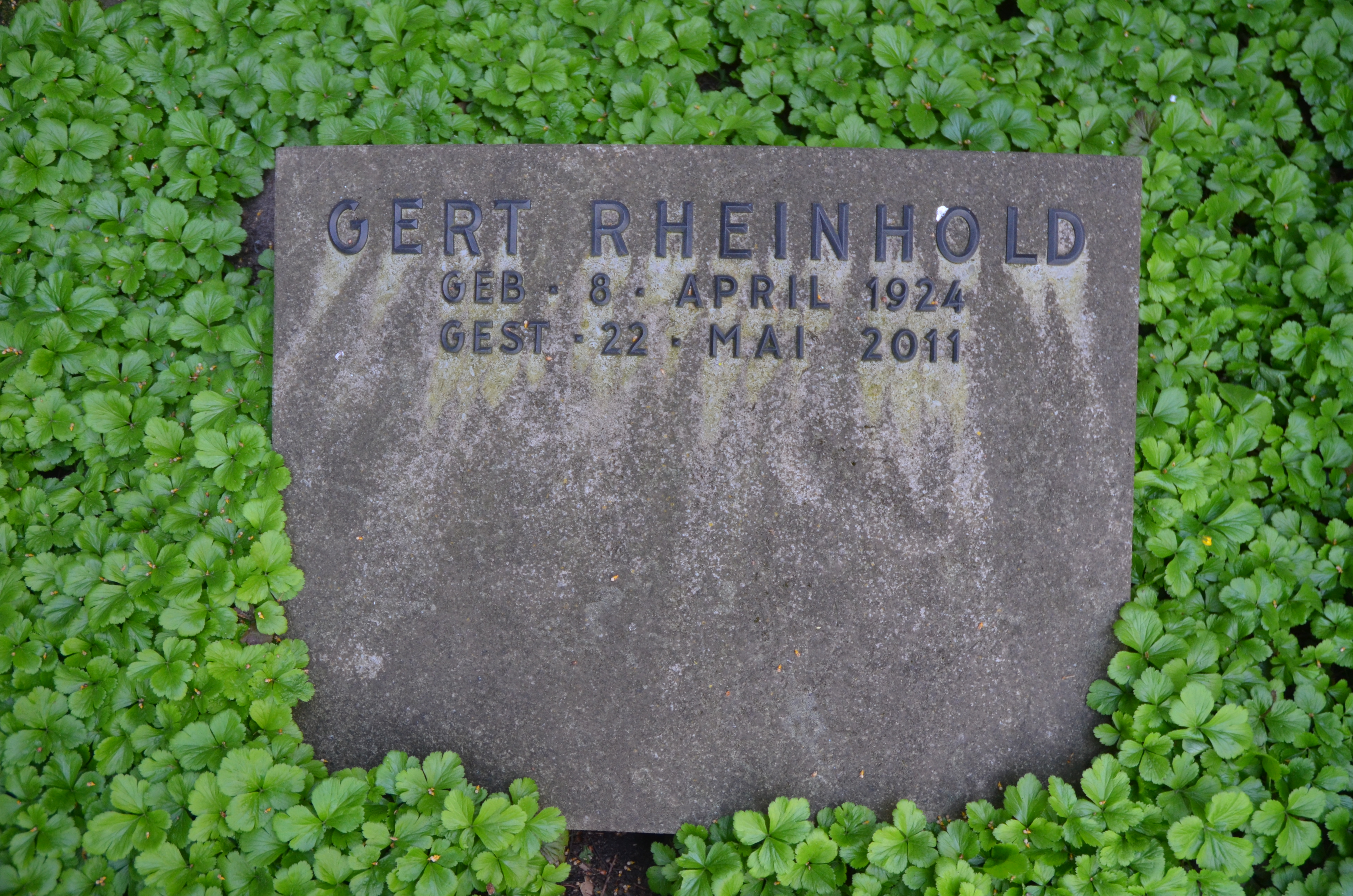 Erbbegräbnis der Familie Rheinhold, darunter der Fabrikant und Wohltäter Otto Rheinhold, auf dem Stadtfriedhof Stöcken in Hannover ...